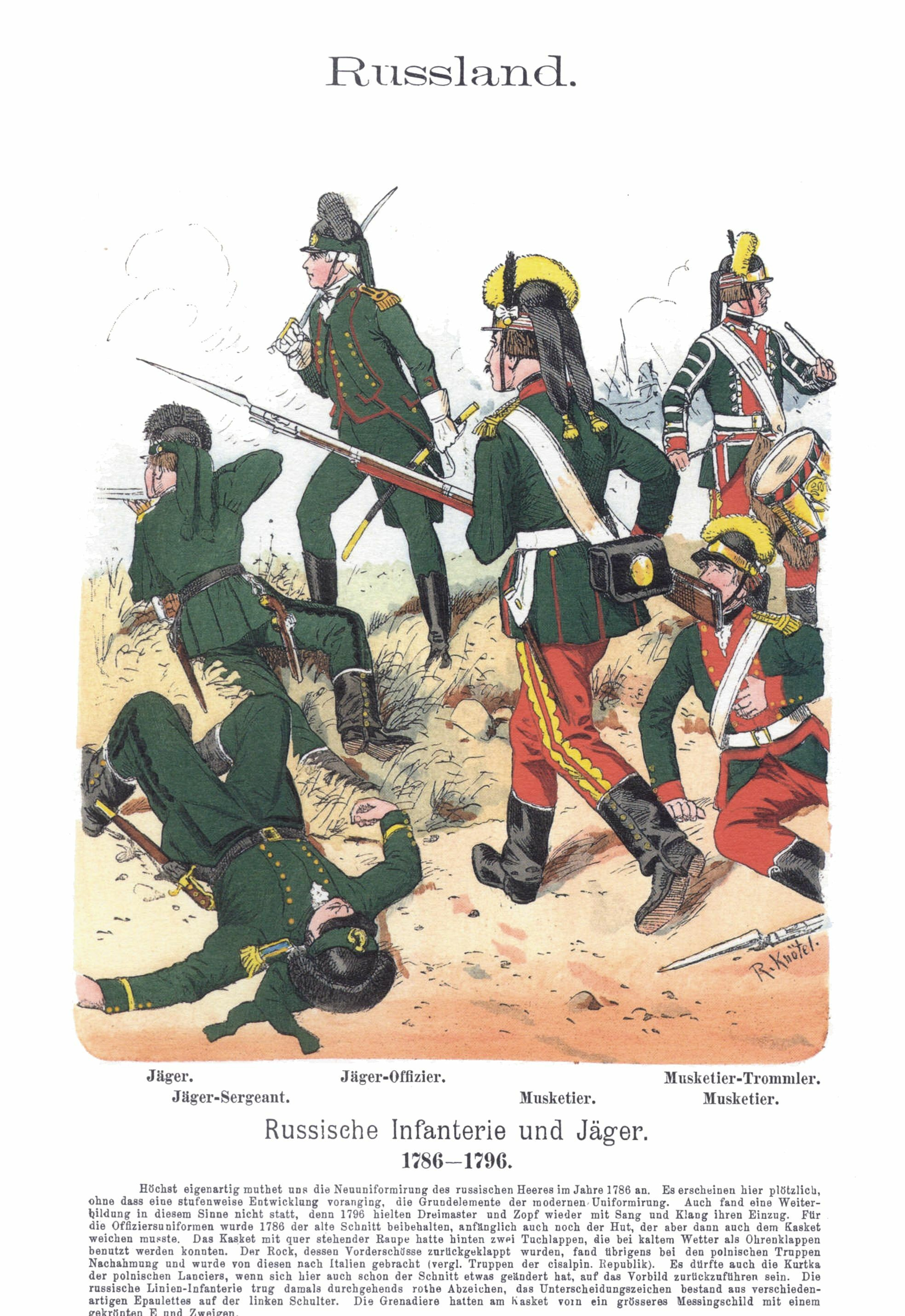 Russische Infanterie der Jahre 1786-1796 in der Potemkin-Uniform